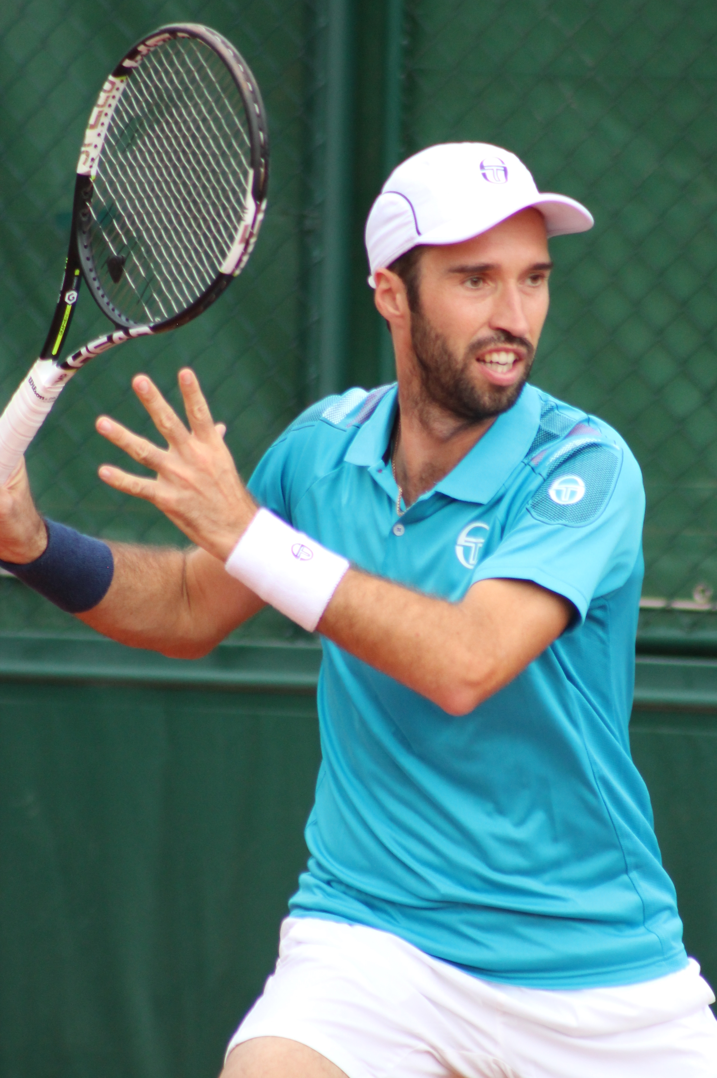 Kukushkin RG15 (20)